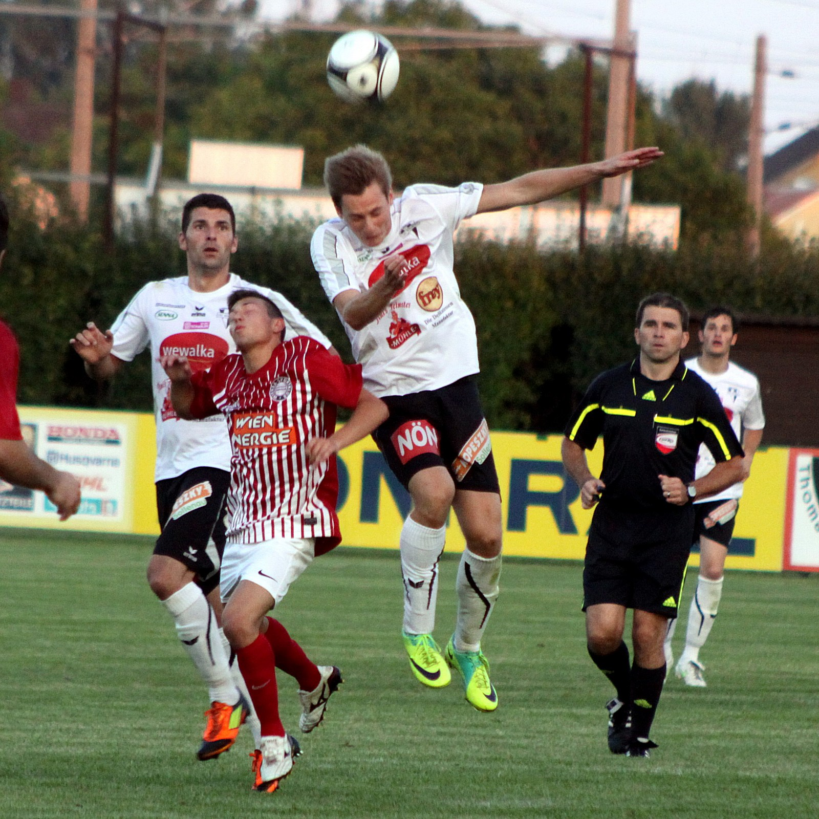 Österreichischer Fußball-Cup 2013/14 am 12. Juli 2013 – 1. SC Sollenau vs. Wiener Sportklub 1:1 (1:0) / 1:1 nach Verlängerung, 5:4 im Elfmeterschießen